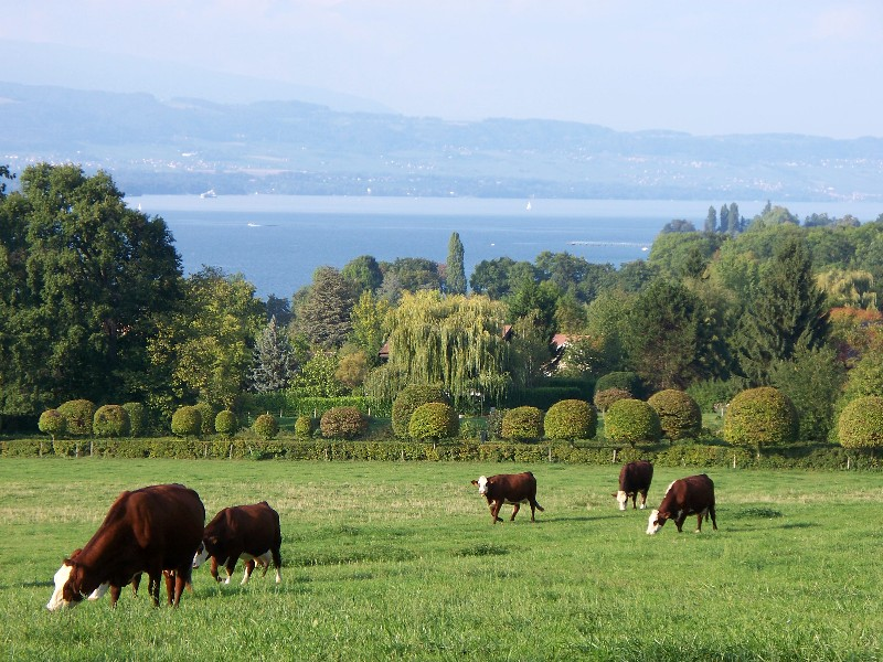 Vue sur le lac Léman